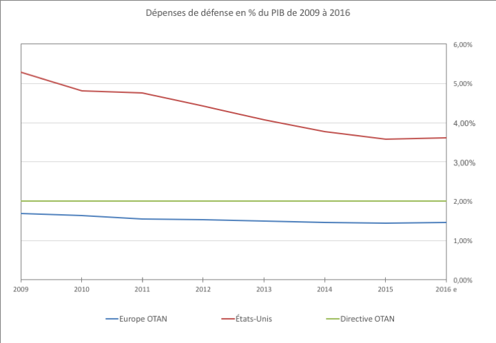 Ce graphique montre l'évolution des dépenses de défense des États-Unis et des pays européens membres de l'OTAN en % du PIB, au regard de l'objectif de 2% agréé par tous les membres de l'OTAN. (Source OTAN : Les dépenses de défense des pays de l'OTAN (2009-2016)